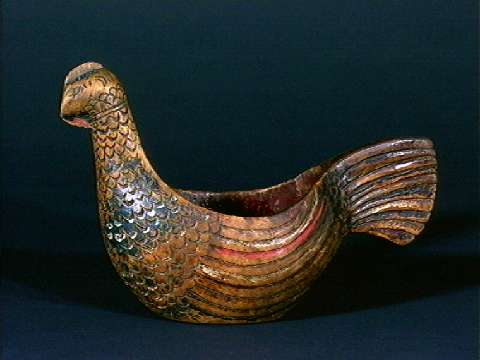 Ølfugl fra Lesja i Oppland. Innkjøpt av Nordiska museet i 1881 og nå deponert på Norsk Folkemuseu i Oslo, Lengde 24 cm. NF.1992-0442.